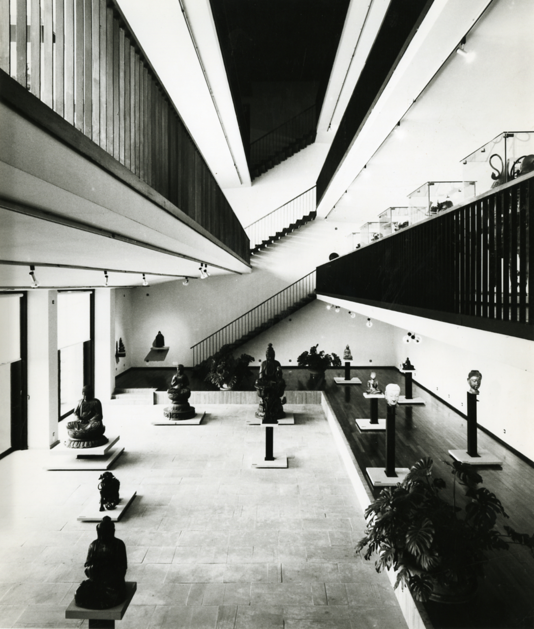 Genova. Museo d'Arte Orientale Edoardo Chiossone. Salone principale: gruppo di grandi sculture giapponesi in bronzo del PeriodoEdo. Servizio fotografico : Genova, 1967 / Paolo Monti. - Stampe: 1 : Positivo b/n, gelatina bromuro d'argento/ carta, 24x30. - ((Al verso di una stampa manoscritto il numero del negativo corrispondente: 17096, e didascalia con datazione: 1971. - Sul coperchio della scatola iscrizione didascalica manoscritta a pennarello nero: "Musei". - Il Museo, dopo la chiusura nel 1940, riaprì al pubblico il 7 Maggio 1971. - Occasione: Documentazione del nuovo allestimento del Museo Chiossone dell'Ingegnere Luciano Grossi Bianchi. - Fonte: Agenda di Paolo Monti: 4/ 30 marzo 1971/ / dal N° 16824 al N° 17956 (1971-1976), presso Archivio Paolo Monti. - Fonte: Monografia: Museo d'Arte Orientale E. Chiossone: catalogo provvisorio, Genova, Sagep (1971)